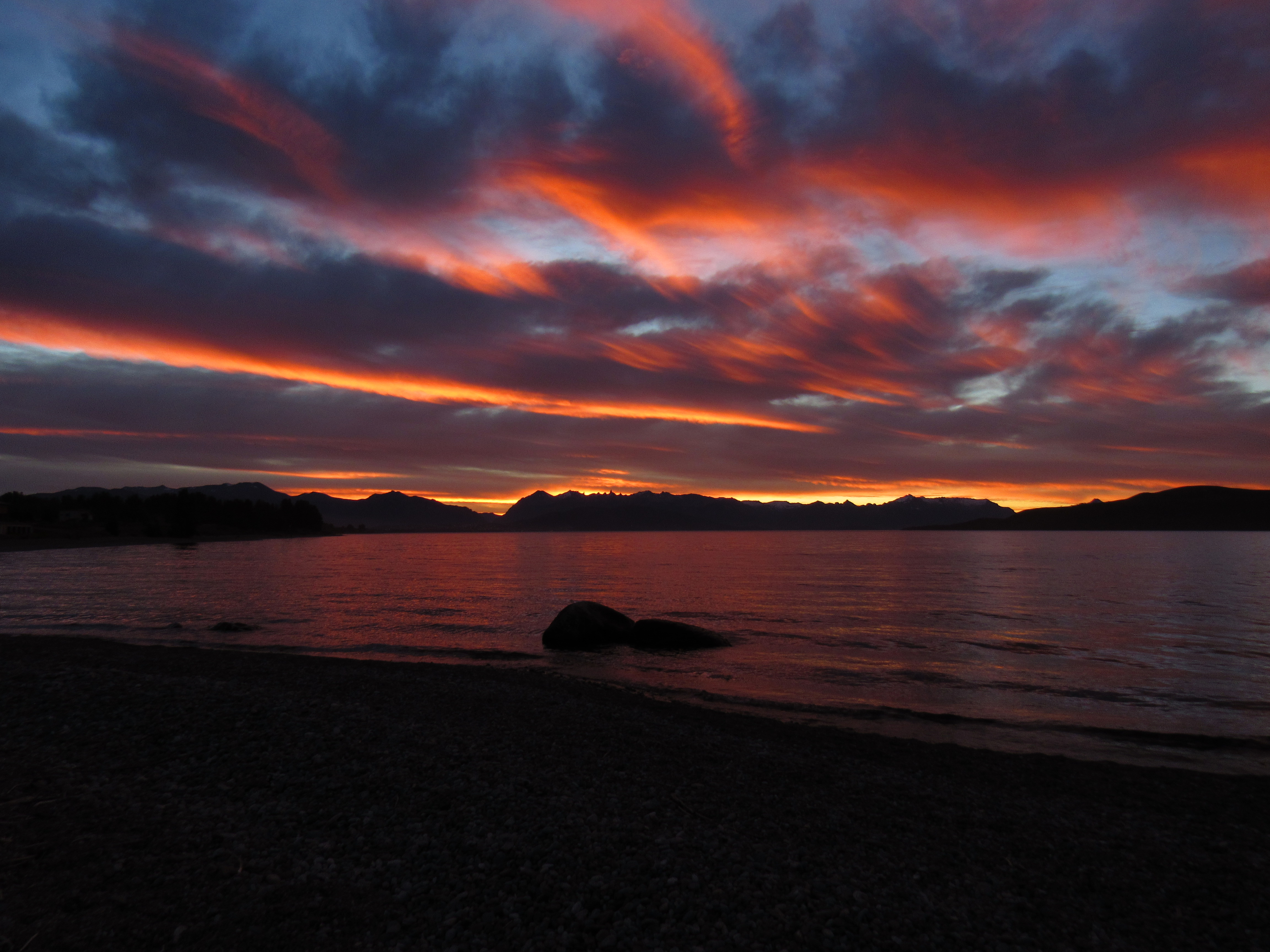 Atardecer en el Lago Nahuel Huapi, Dina Huapi, Río Negro, Argentina